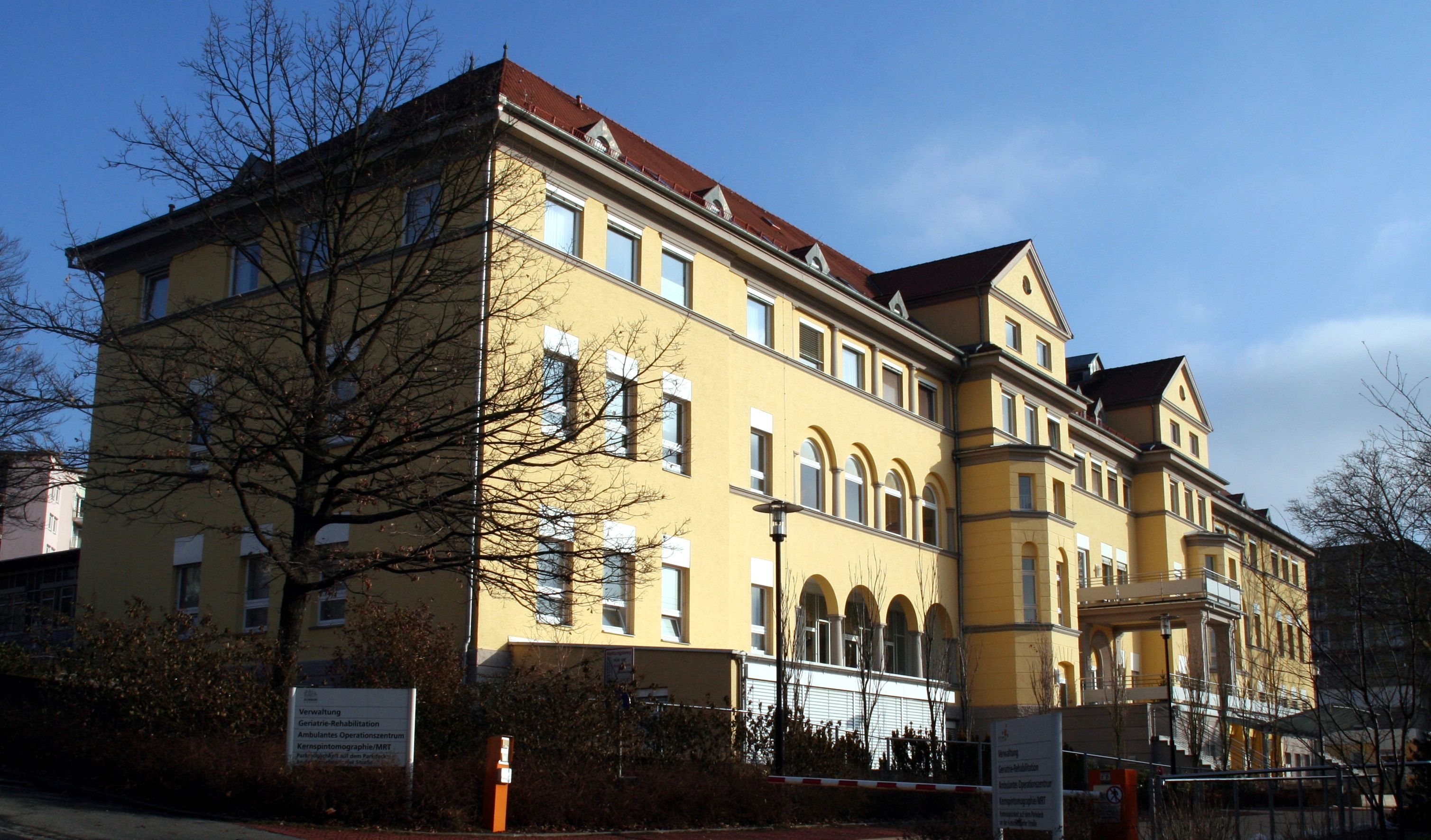 Klinikum, Ketschendorfer Straße 33 in Coburg